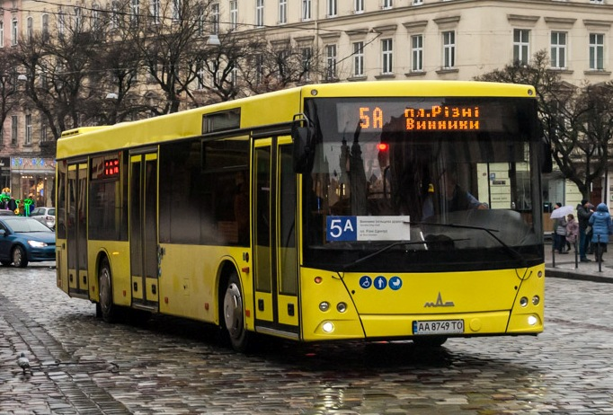 MAZ-203 in Lviv